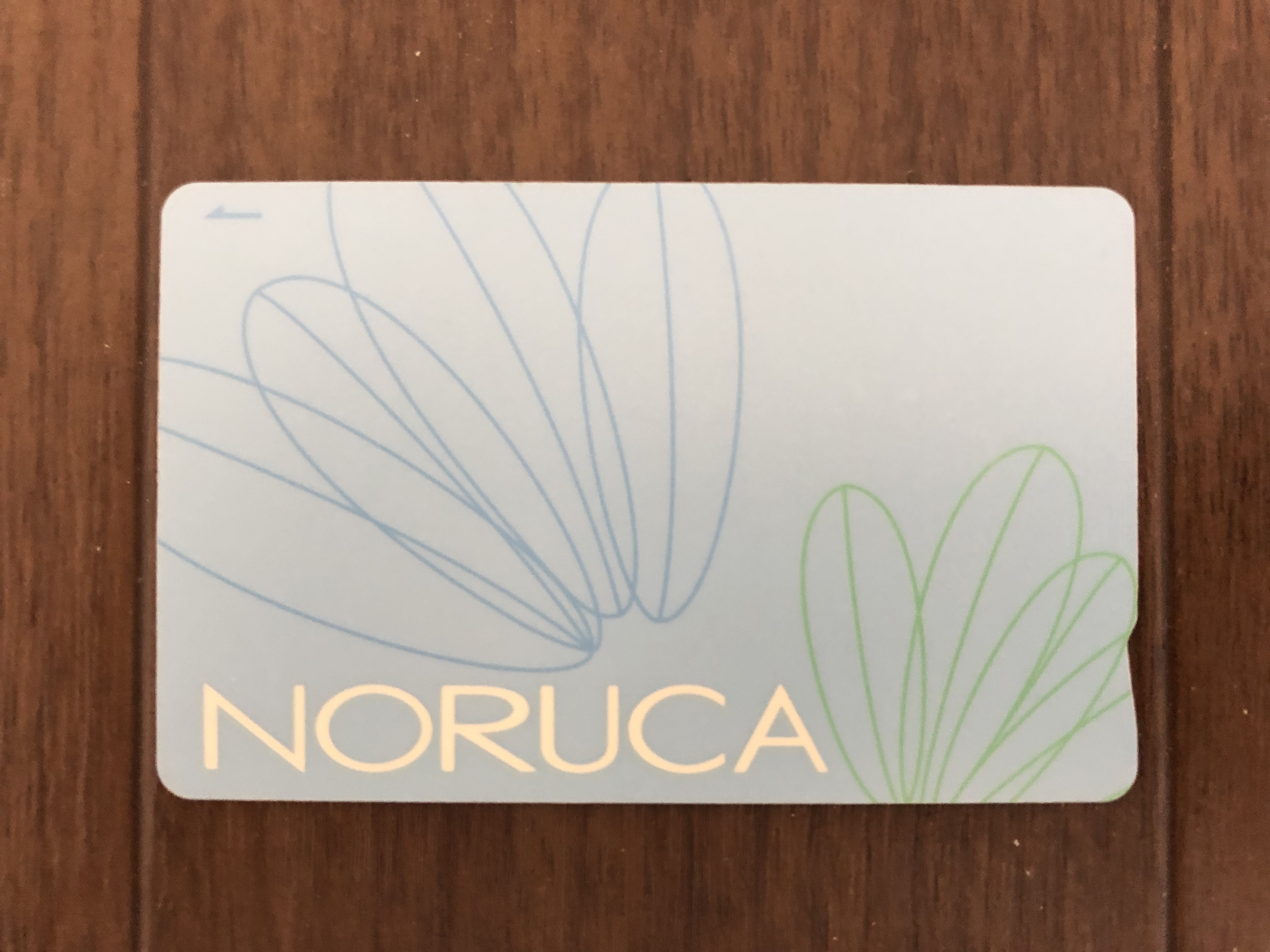 福島交通のICカード乗車券